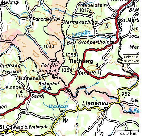 Umgebung Tischberg (Waldviertel) und Kamenec (Gratzener Gebirge) (Freiwald, NÖ/OÖ). adapt.+beschrift.Ausschnitt ~20x20 km aus ÖK500